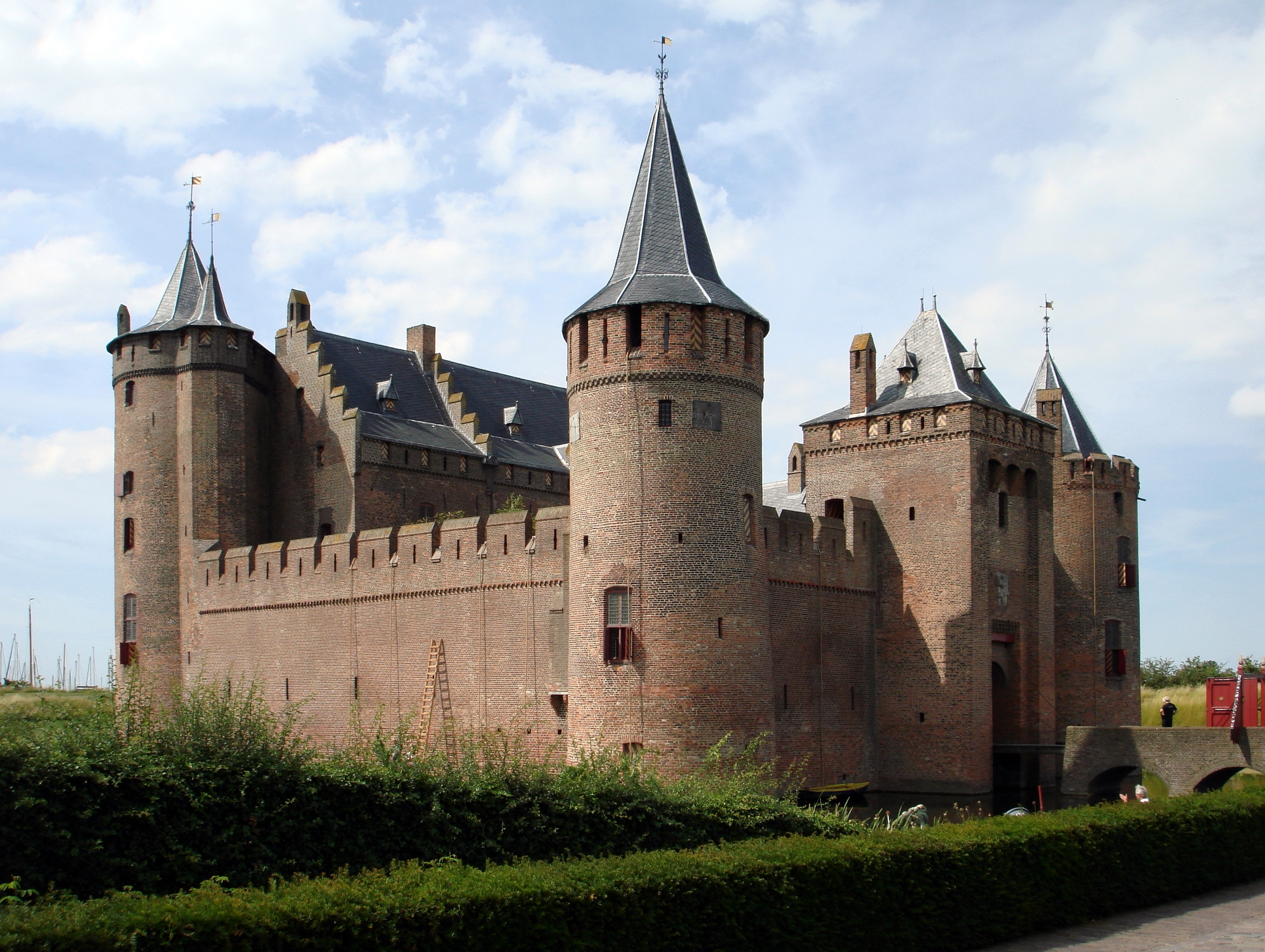 Muiderslot wikipedia page Muiden, Netherlands Castle+Windmills bike ride